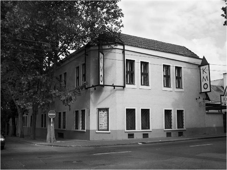 Kispesti Munkásotthon Művelődési Ház